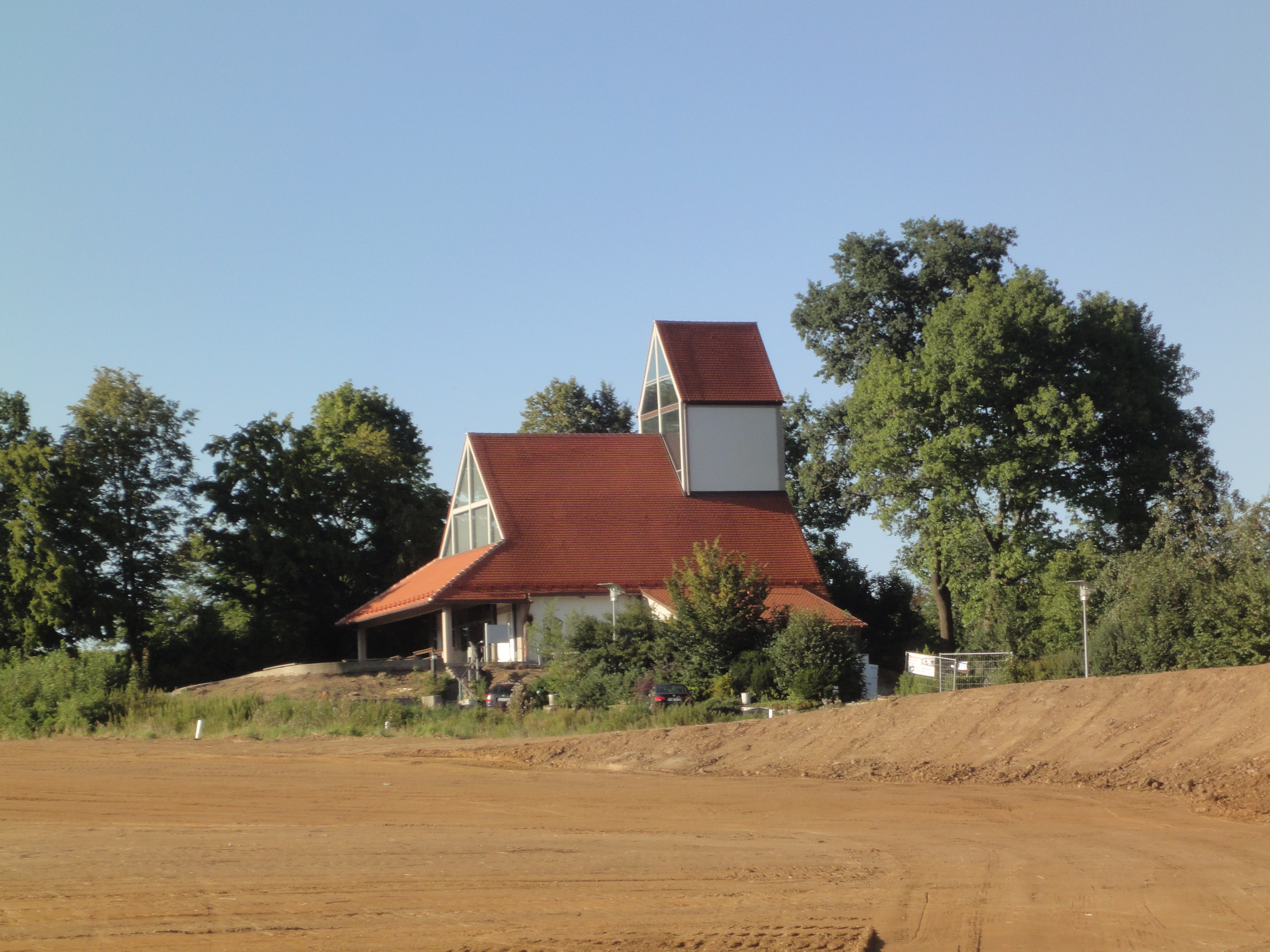 Die Autobahnkirche Maria, Schutz der Reisenden ist eine katholische Autobahnkirche bei Horgau